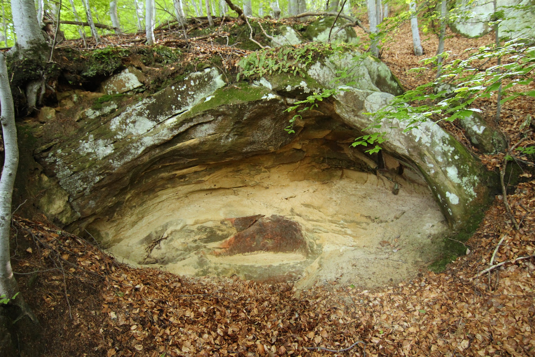 Bucătăria de la Bozioru 09